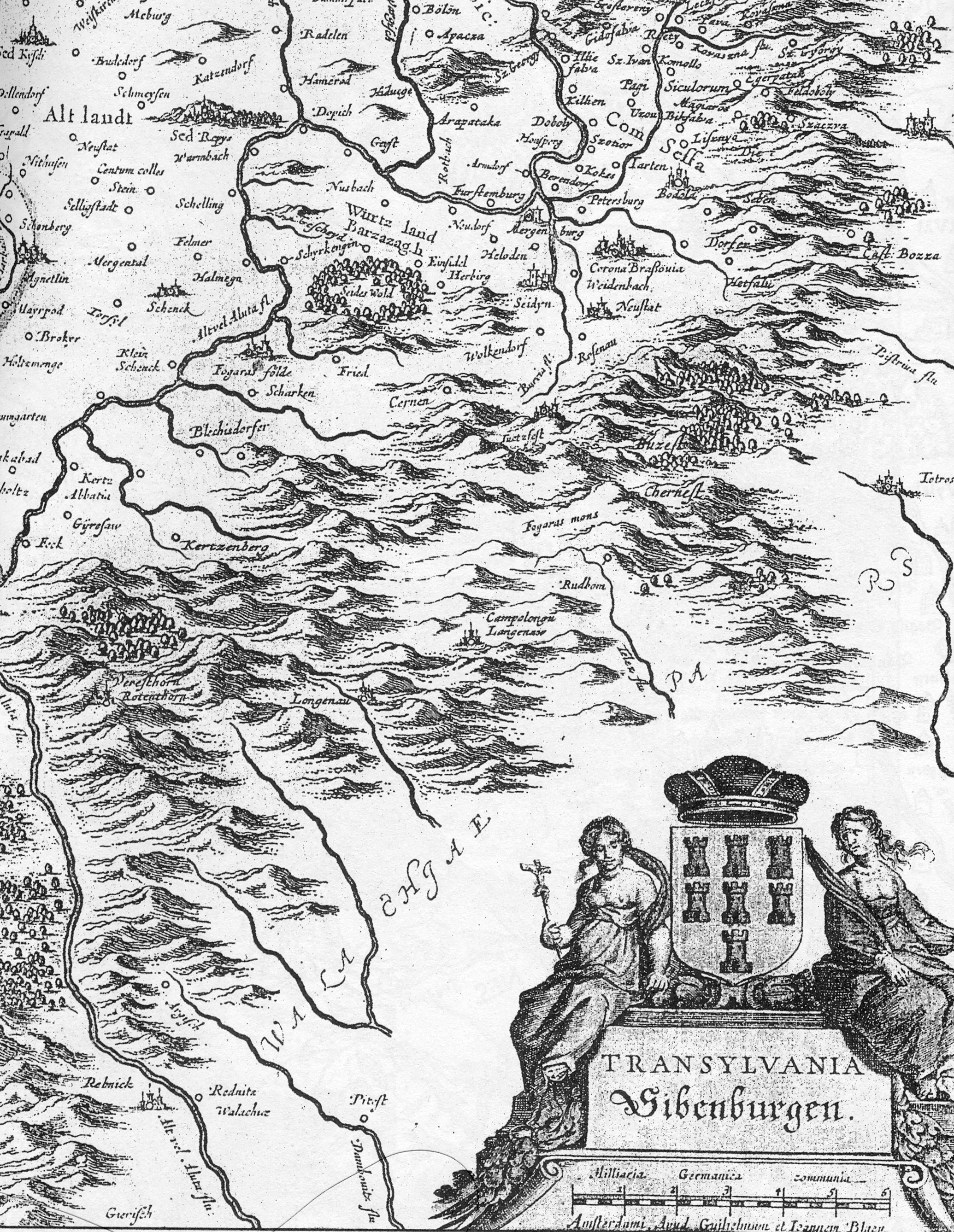 Map of Burzenland